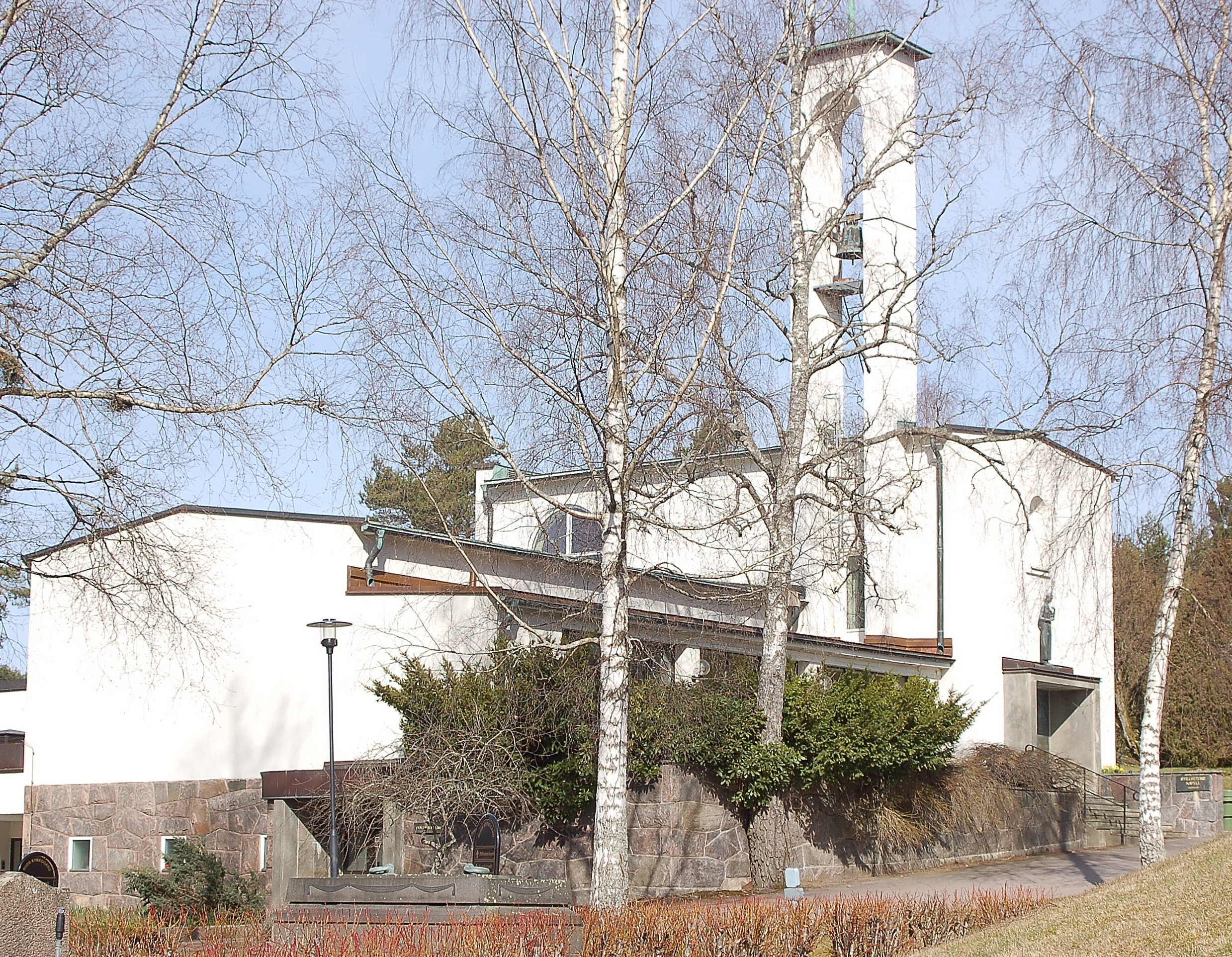 Krematoriet på Ruds kyrkogård. Uppståndelsens kapell på Ruds kyrkogård. Nybyggnadsår 1938, Arkitekt Gustaf Birch-Lindgren. 1968 gjordes en omfattande om- och tillbyggnad av kapellet och krematoriet med bl a Korsets kapell. Arkitekt Rudolf Holmgren ritade om- och tillbyggnaden.